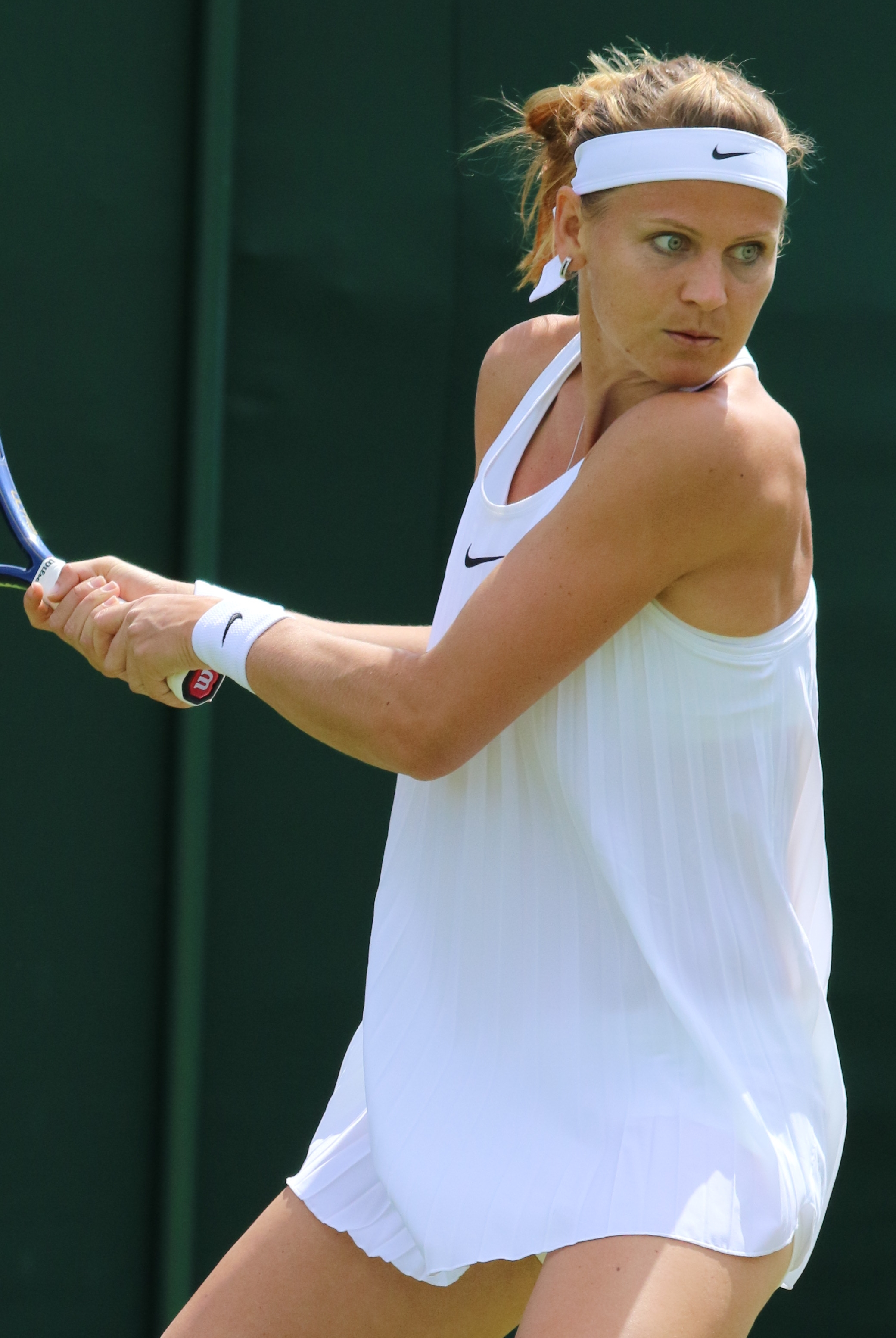 Safarova WM16 (12)